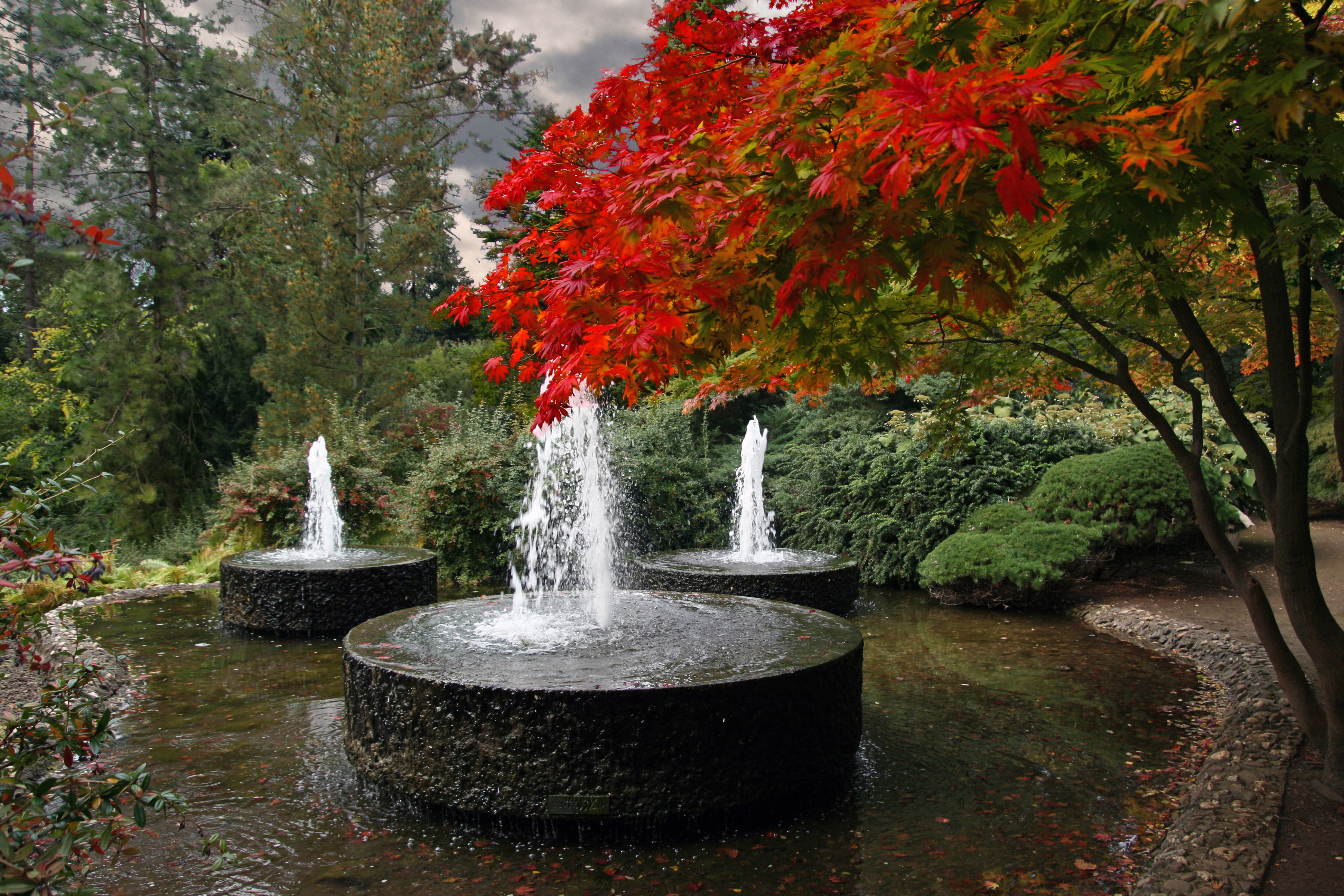 Wasserspiele im Kölner Forstbotanischen Garten